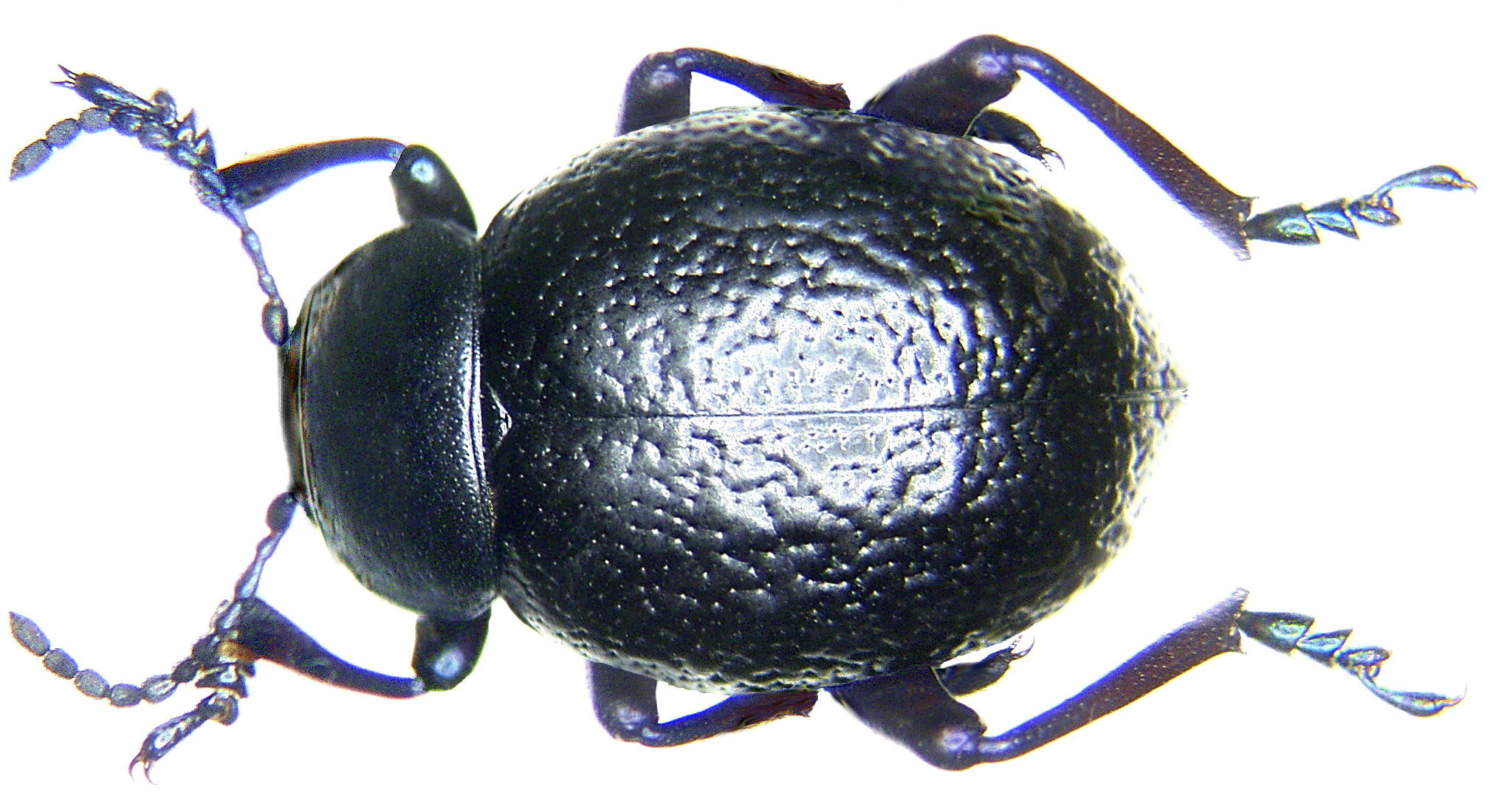 Timarcha sardea (Villa, 1835) Familie: Chrysomelidae Groesse: 13 mm Fundort: Sardinien, Monte Nai, Costa Rei leg. U.Eitschberger, 1986; det. Kippenberg Photo: U.Schmidt, 2006